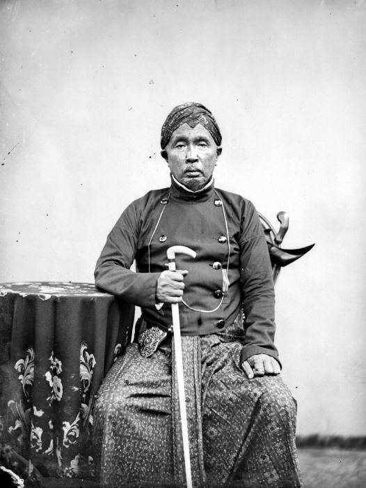 Negatief. Regent van Tjilatjap